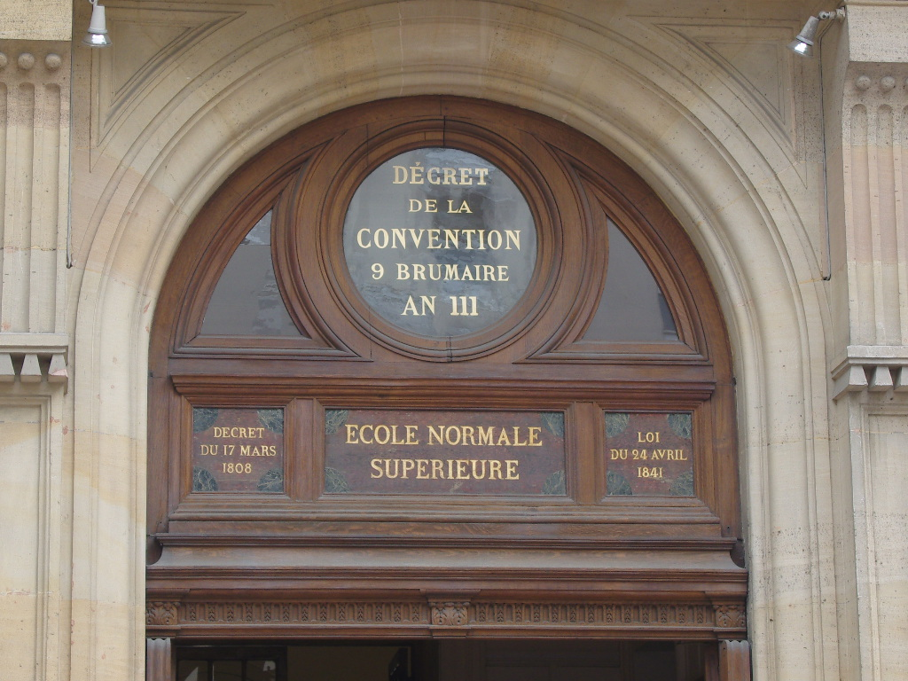 Paris, rue d'Ulm, Ecole normale supérieure, médaillon de la porte d'entrée